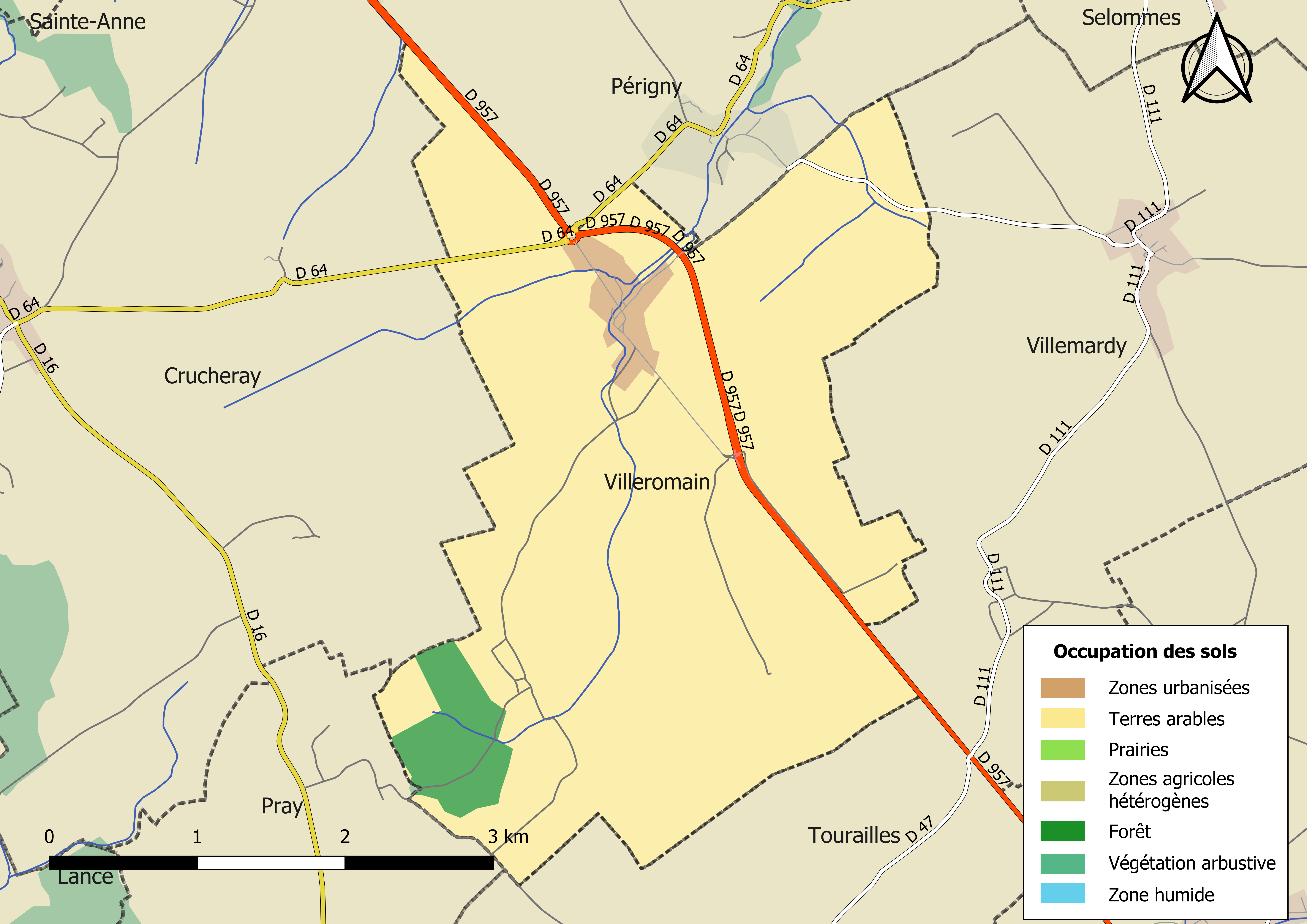 Carte des infrastructures et de l’occupation des sols en 2018 de la commune de Villeromain (France).